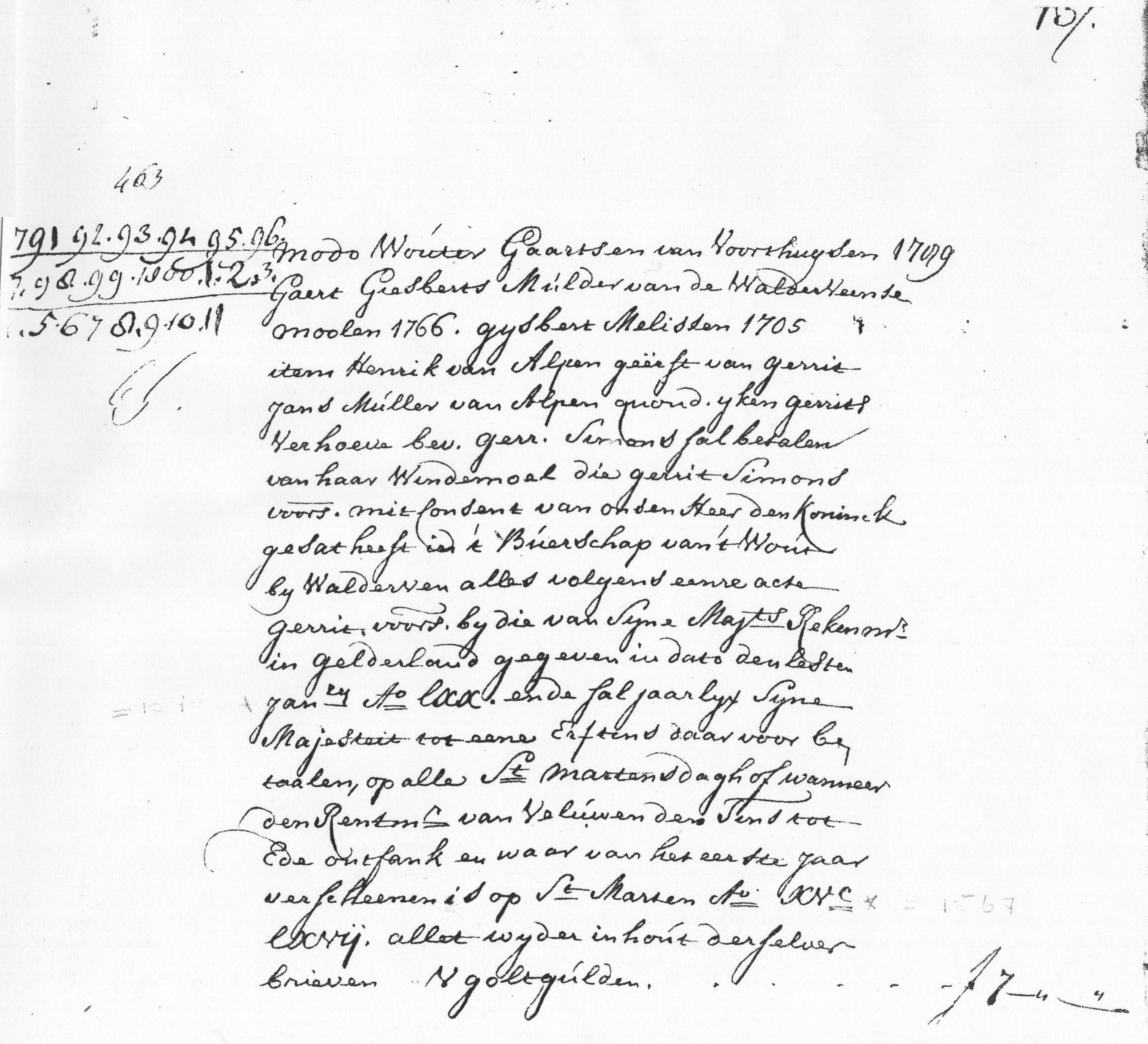 Tynsboek Ede vanaf 1792, Walderveense molen